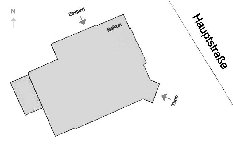 Selbst erstellter Gebäudegrundriss der Villa Prinz in Hemer, Hauptstraße 209.